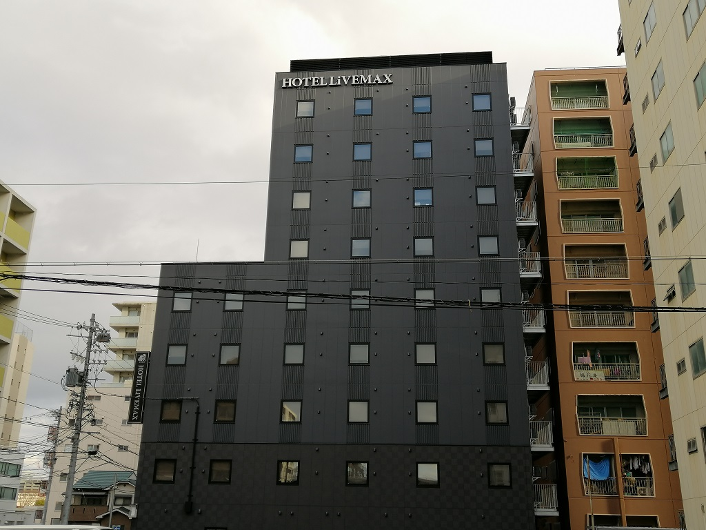 Hotel LiVE MAX, Kanayama, Nagoya